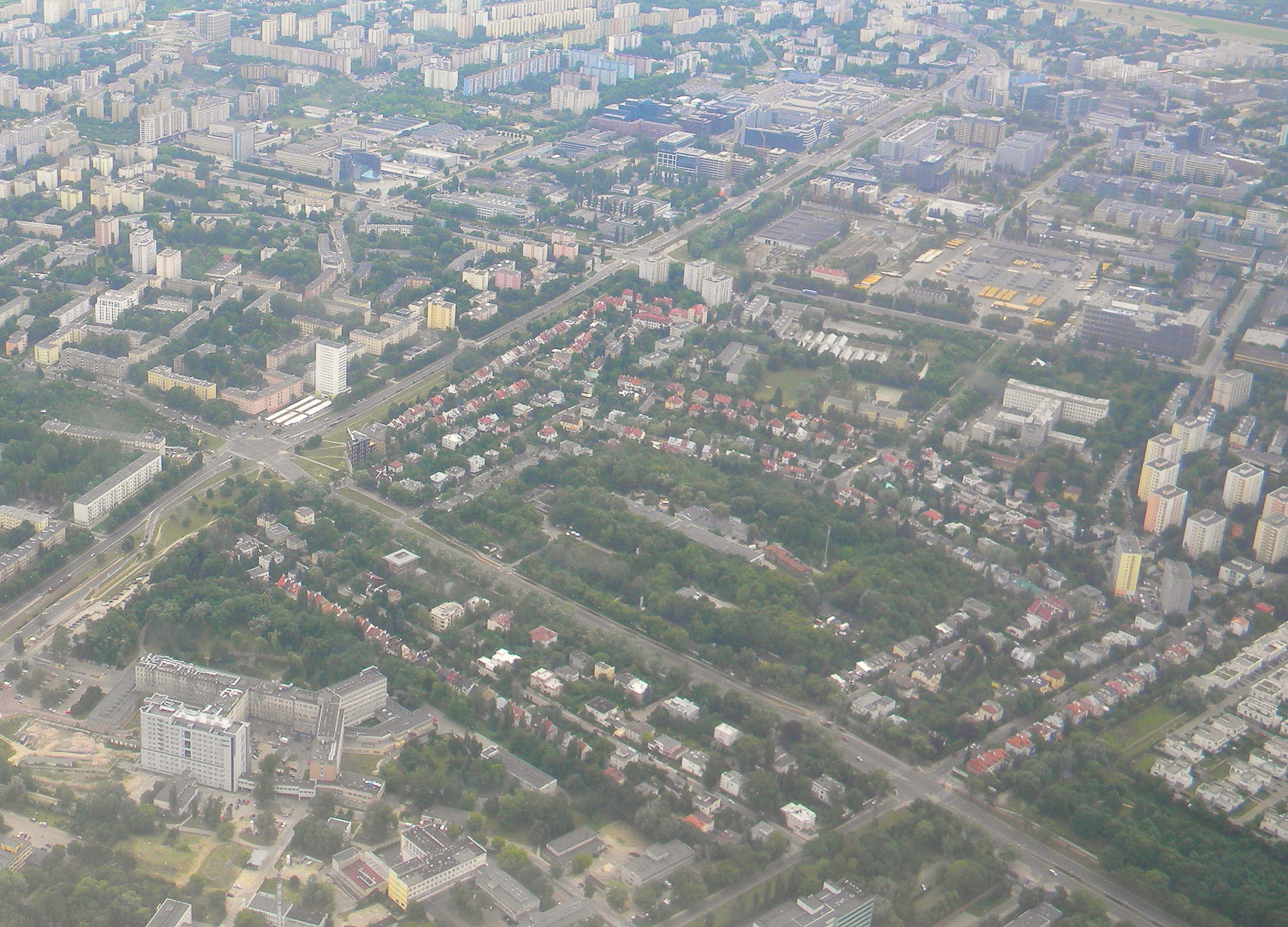 Fort Moktów z lotu ptaka